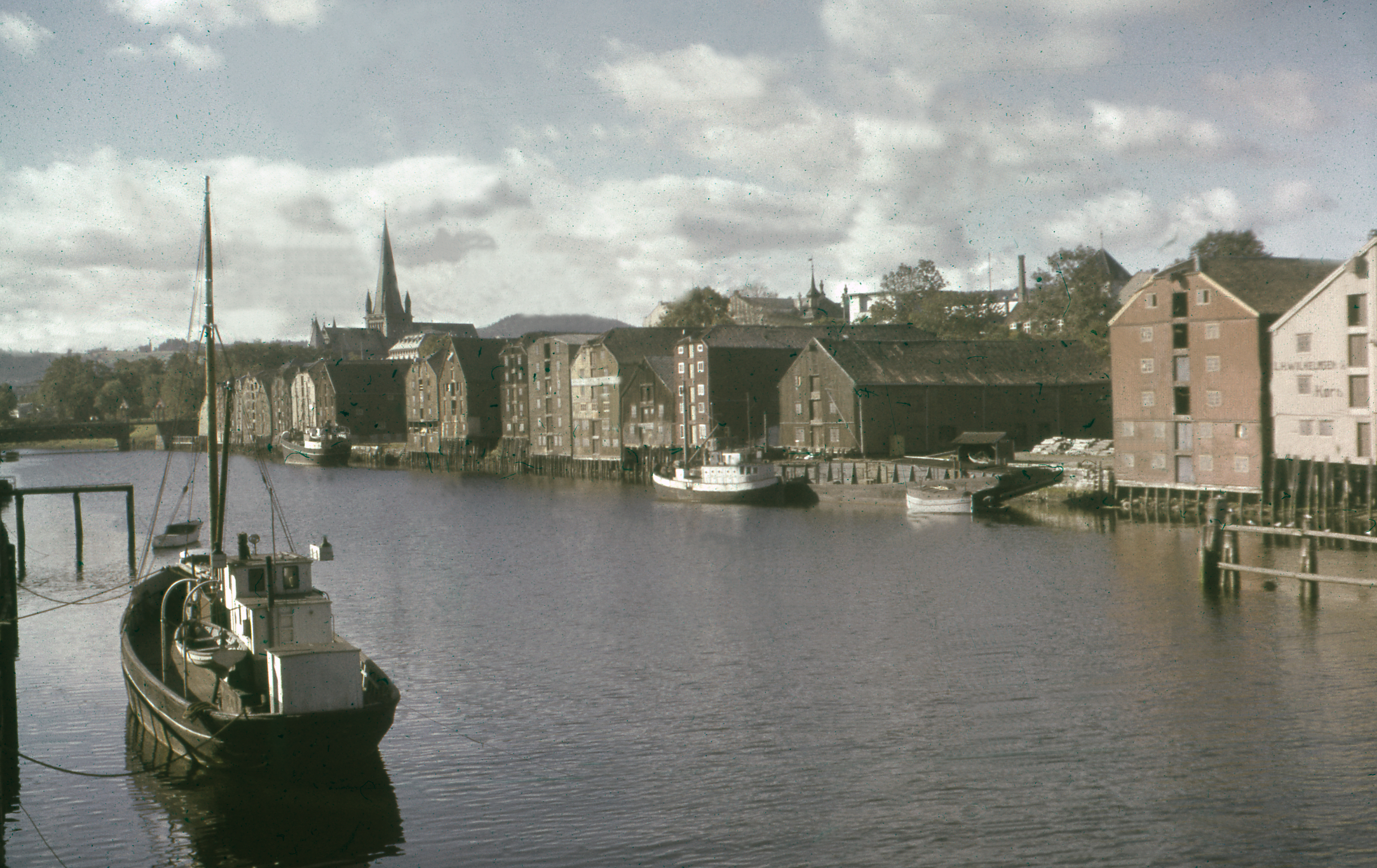 Format: Glasspositiv (Dias) Dato / Date: ca. 1954 - 1968 Fotograf / Photographer: Ukjent Sted / Place: Nidelva, Trondheim Eier / Owner Institution: Trondheim byarkiv, The Municipal Archives of Trondheim Arkivreferanse / Archive reference: Tor.H43.B77.F18500 Merknad: Fra Byantikvarens lysbildesamling. Bildene er merket Trondheim 1954 - 1968, men de aller fleste synes å være fra omkring 1954 / 1955.